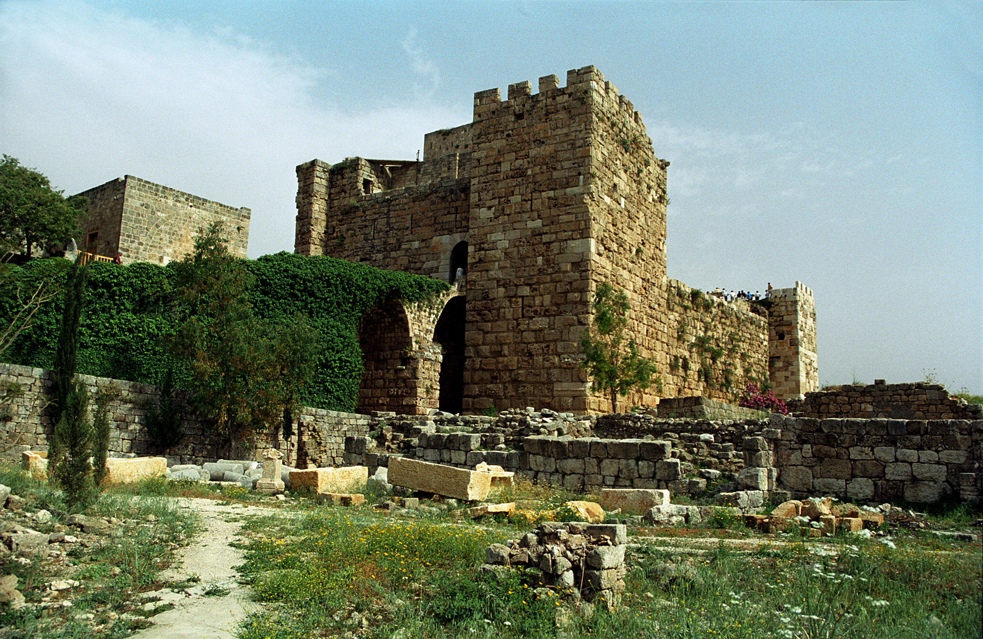 Byblos, Crusader castle